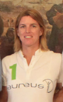 Buenos Aires, 19 de Noviembre de 2012. El jefe de Gobierno de la ciudad de Buenos Aires, Mauricio Macri, recibió hoy al atleta cubano Javier Sotomayor. El encuentro, celebrado en el Salón Blanco del palacio municipal, también contó con la presencia de los atletas argentinos Federico Molinari, Alejandra García, Carlos Gats, Jennifer Dahlgren y Carlos Laloy. Fotos: Matías Repetto-gv/GCBA